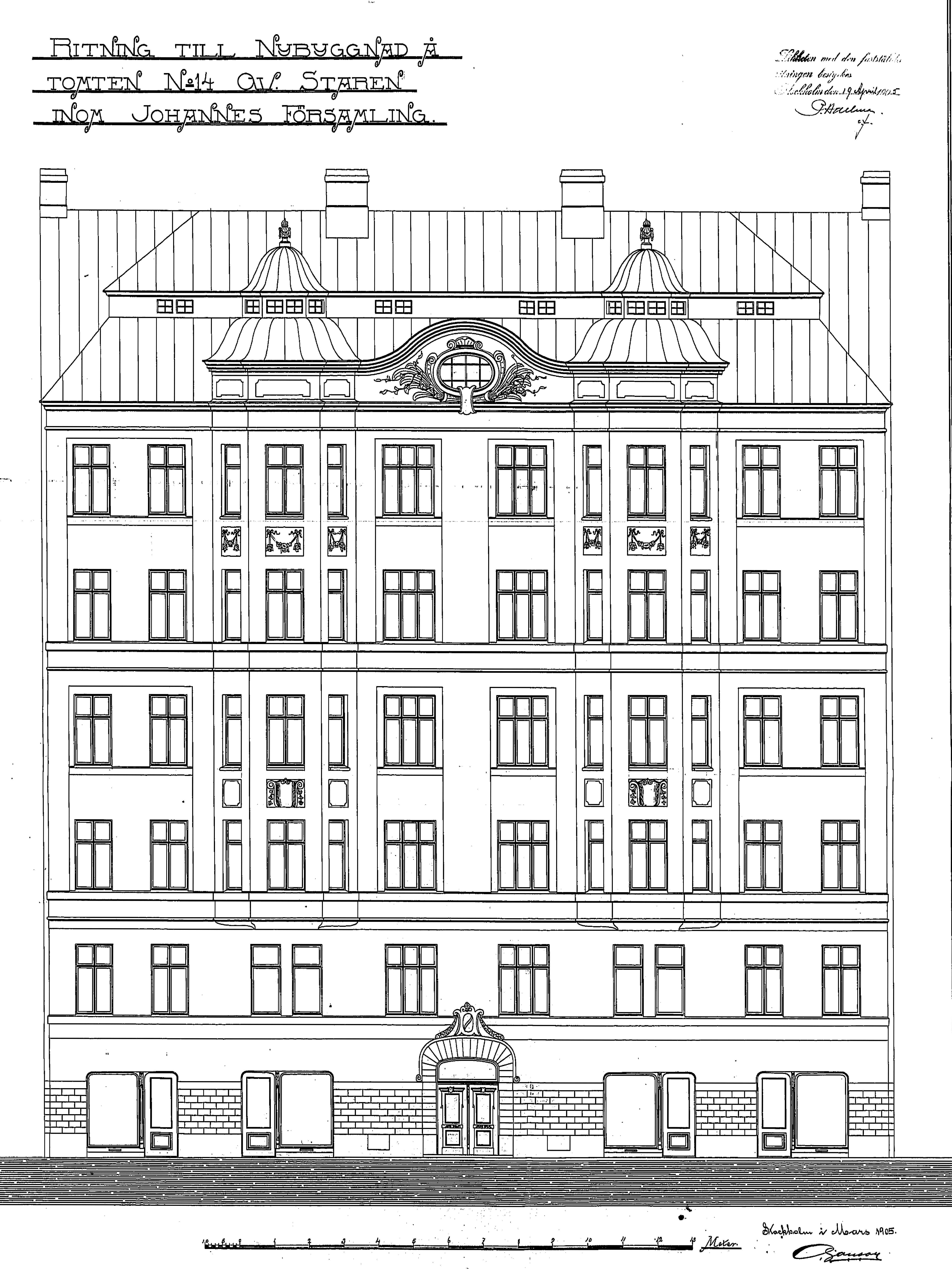 Staren 14, byggnadsritning